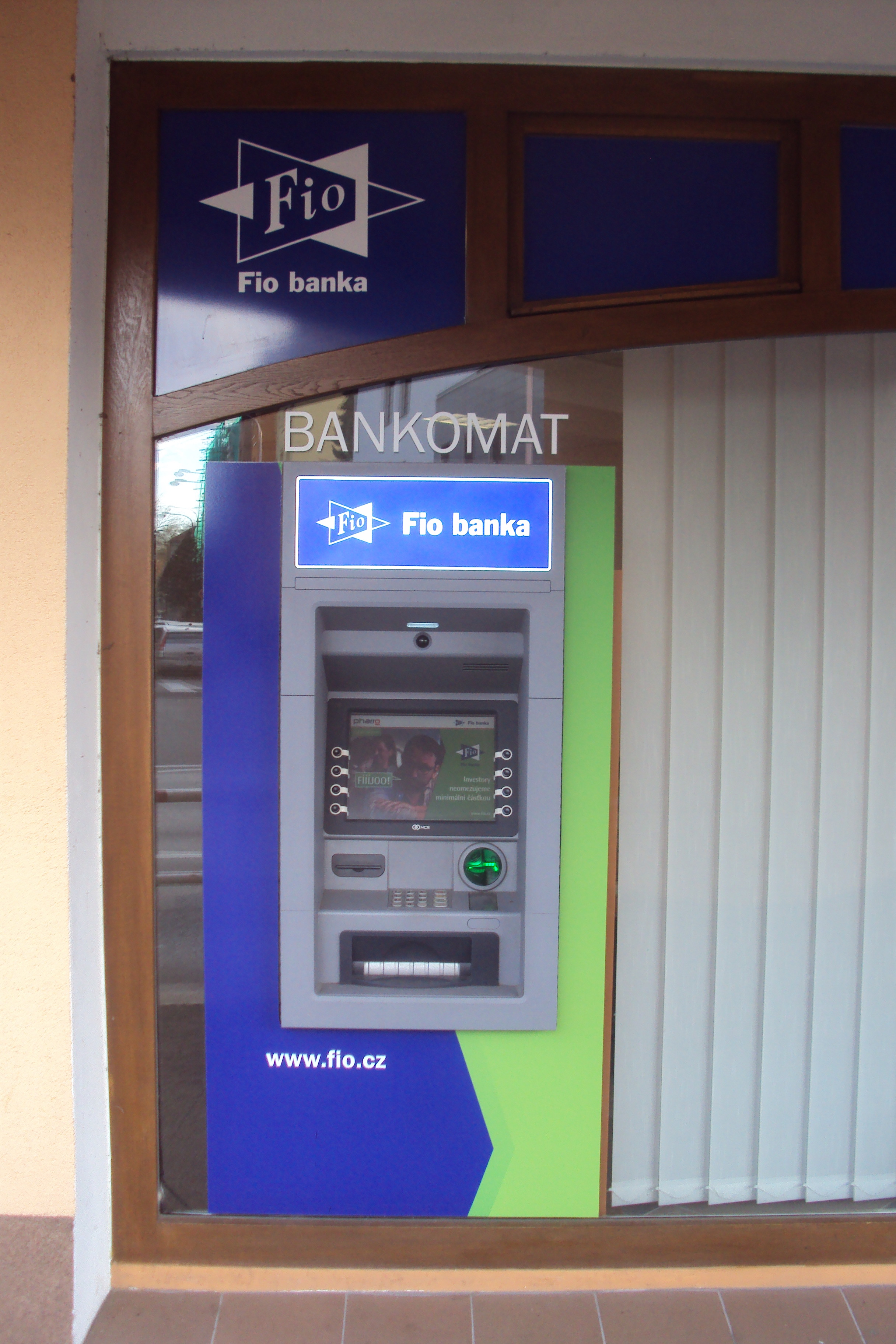 Česky: Bankomat FIO banky, Česká Lípa